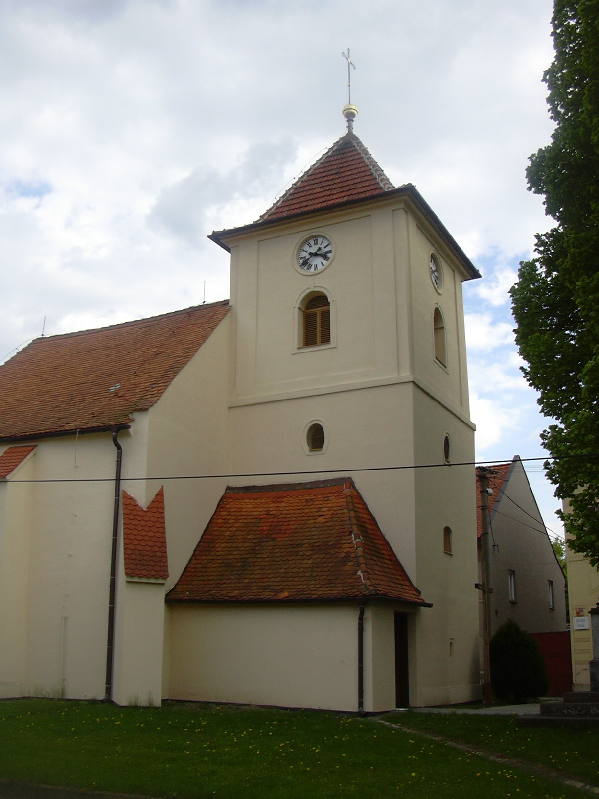 Kostel sv.Jana Křtitele, Hoštice (Vyškov District - Czech Republic)